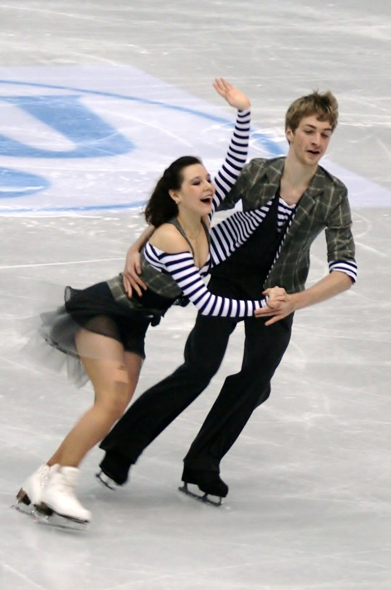 Барбара Сильна и Юрий Куракин (Австрия) на чемпионате мира по фигурному катанию 2012, предварительный раунд.